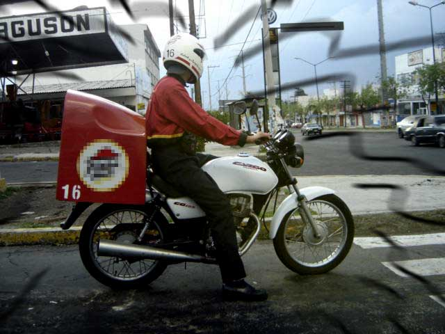 Iba manejando en la calle... y saque la cámara para capturar a este pizza boy en-motociclado.